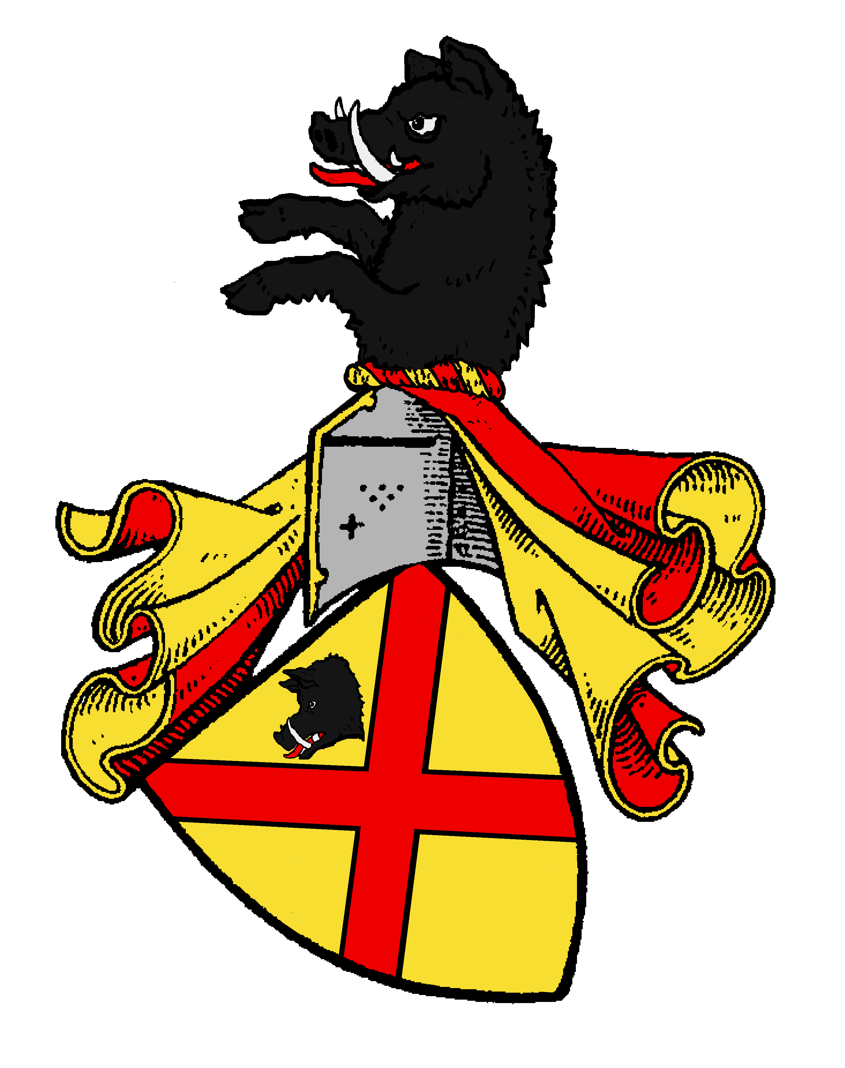 Wappen der Engelbrecht, eines aus dem Limburgischen stammenden alten Geschlechts, das sich noch im ausgehenden Mittelalter als Patrizier nach Aachen und Köln, kurzlebig eine Branche zu Frankfurt a.M., auch nach Amsterdam ausbreitete, wohl aber noch im 17. Jahrhundert im Mannesstamm erloschen ist.